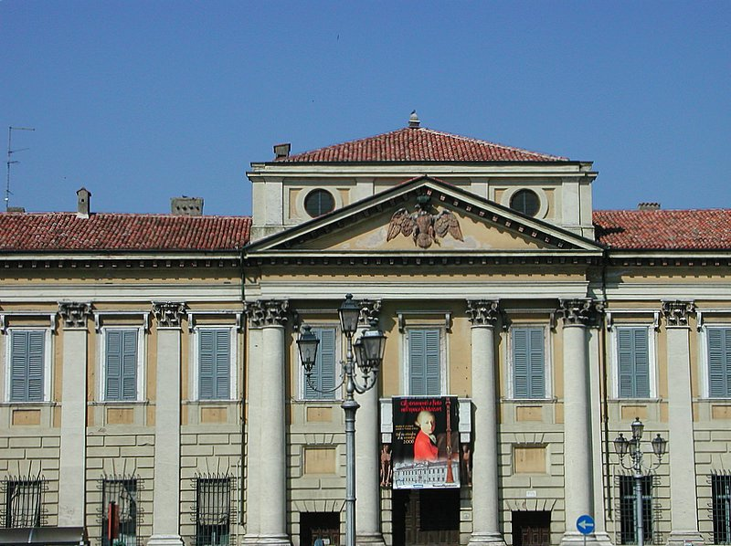 Palazzo d'Arco a Mantova. Source: photo uploaded by User:RicciSpeziari. Photographer: Riccardo Speziari